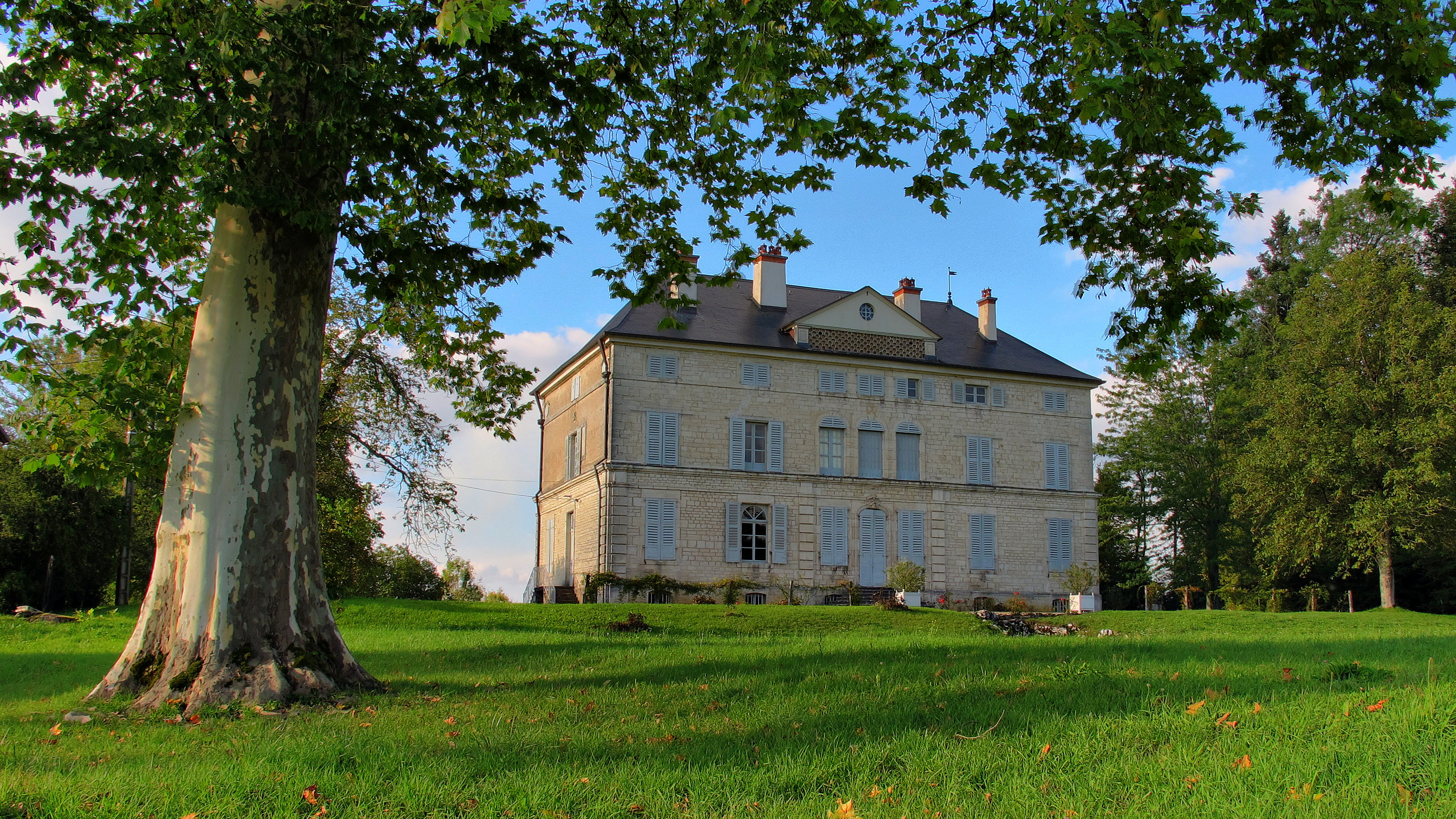 Château de Boulot (Haute-Saône, France)